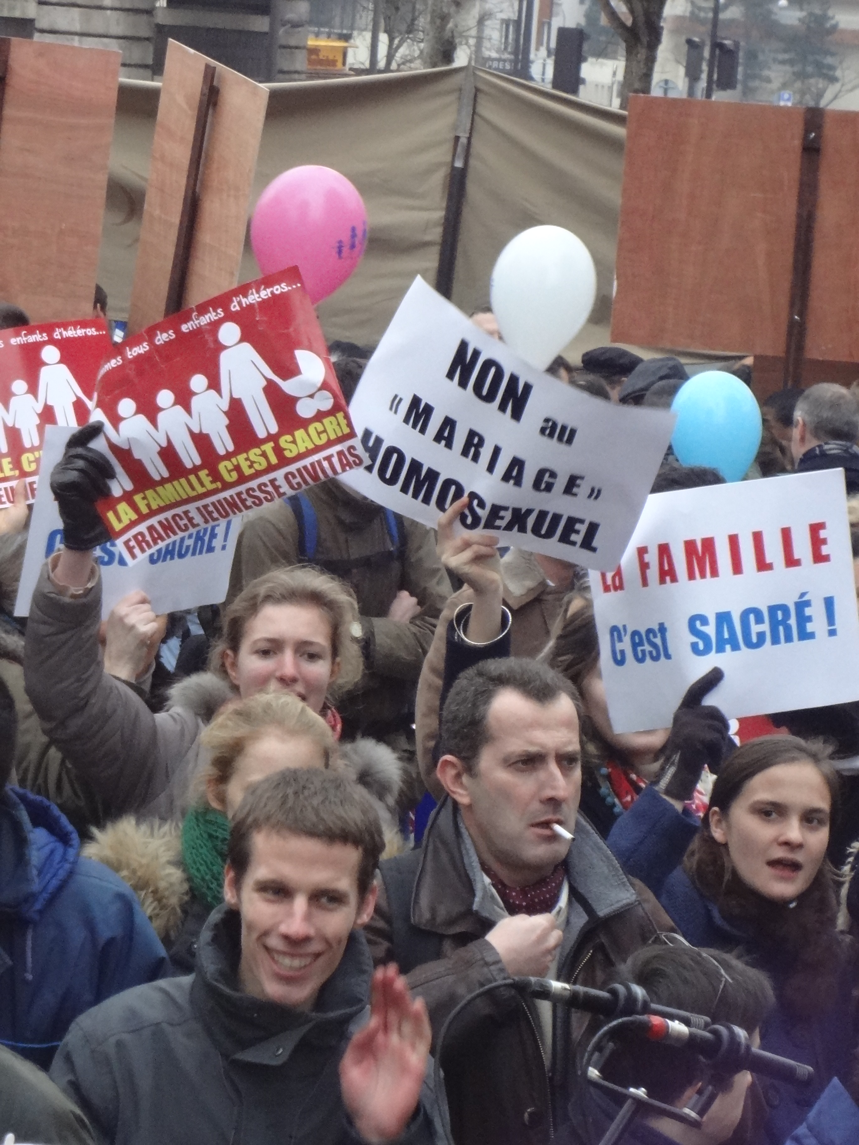 oui à la famille ! non au mariage homo ! Civitas le 13 janvier